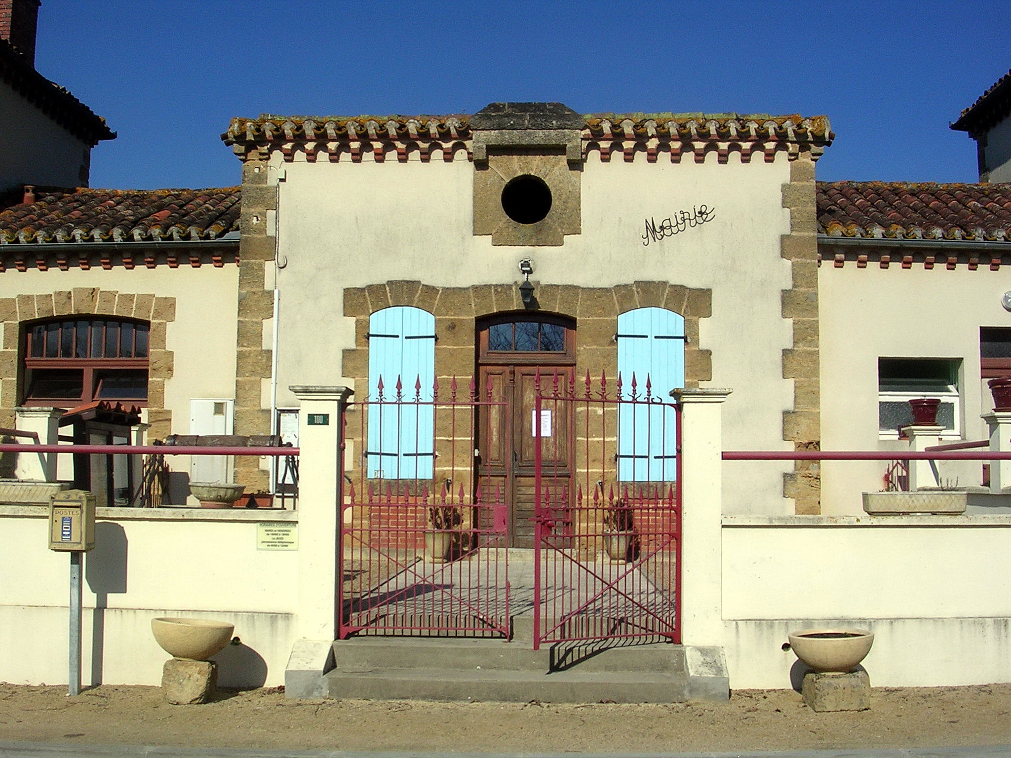 Mairie de Bourdalat